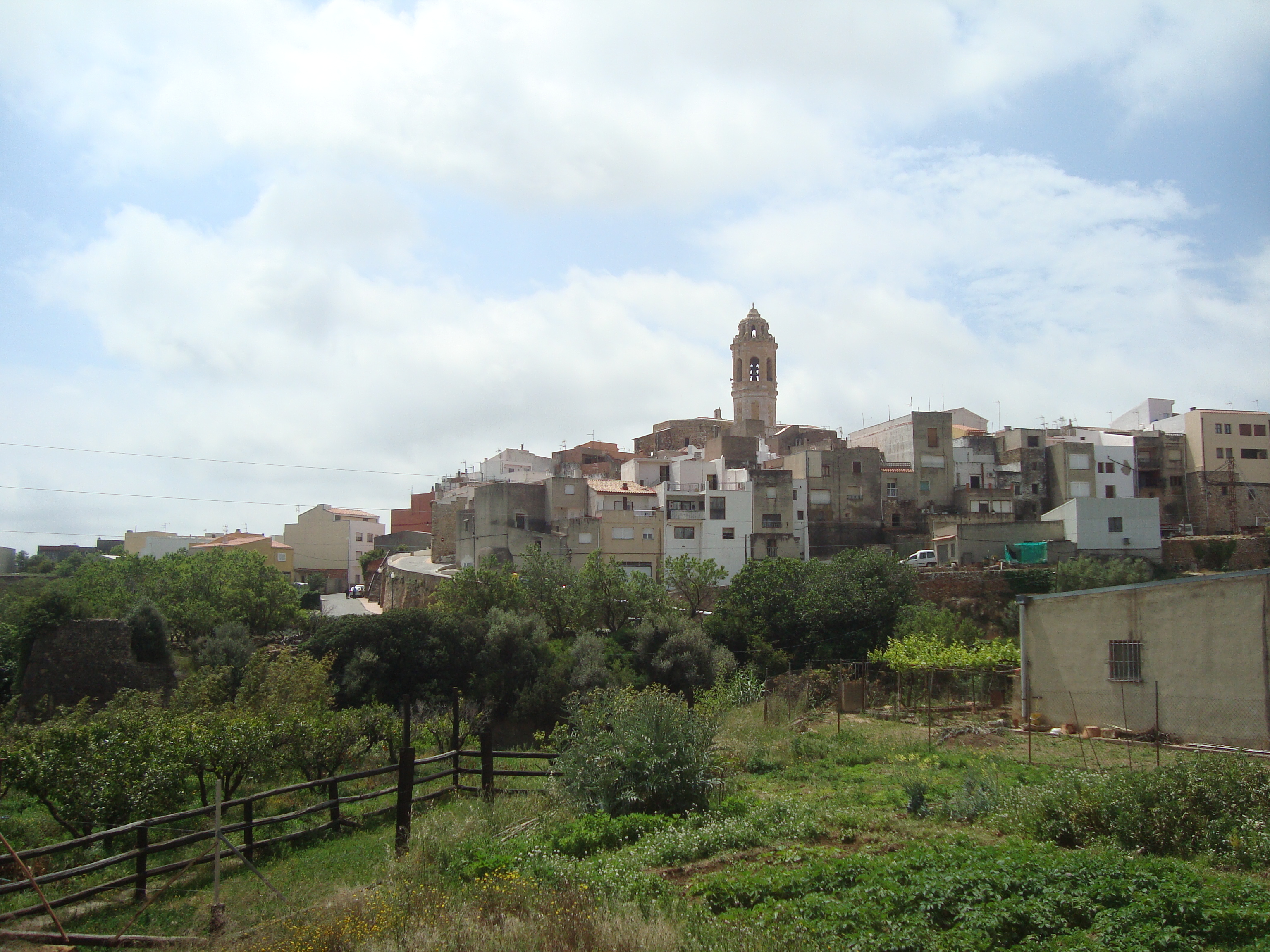 Panorámica de Traiguera (Castellón)